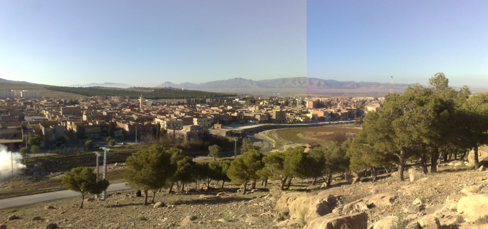 صورة بانوراما لمدينة مروانة